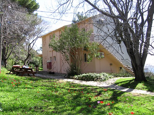 חדרי האירוח באדמית